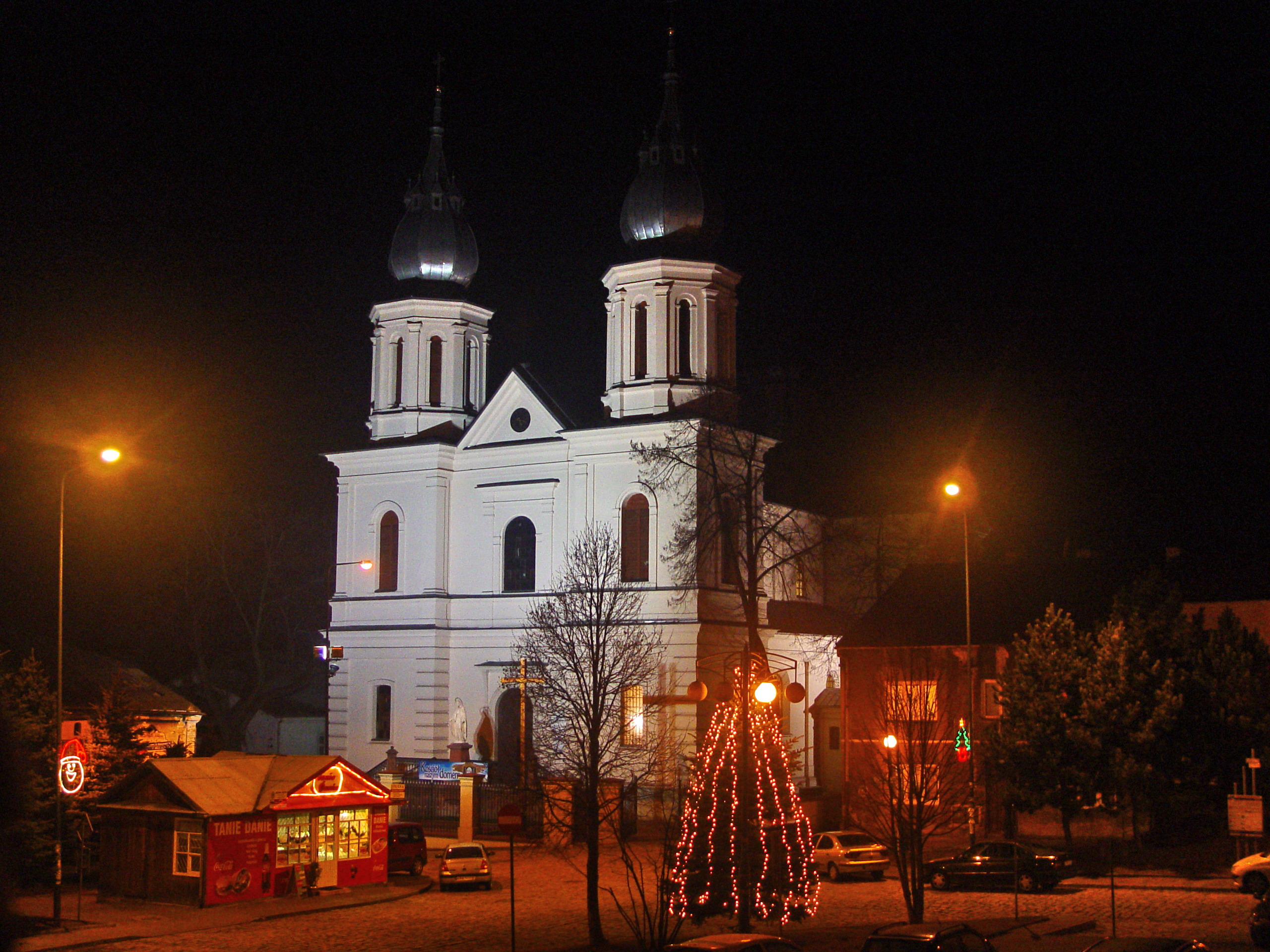 Słomnniki - kościół Bożego Ciała.